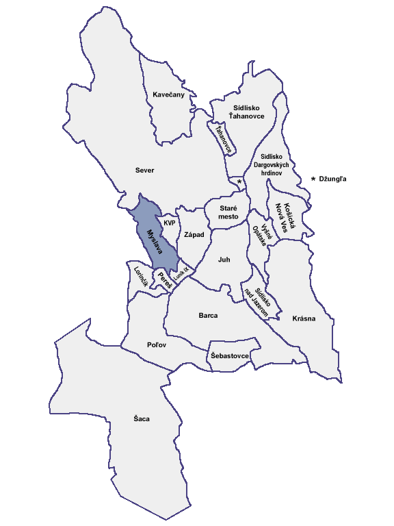 Poloha mestskej časti Myslava v Košiciach Licensing